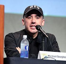 Oʻzbekcha/ўзбекча: Michael Dougherty